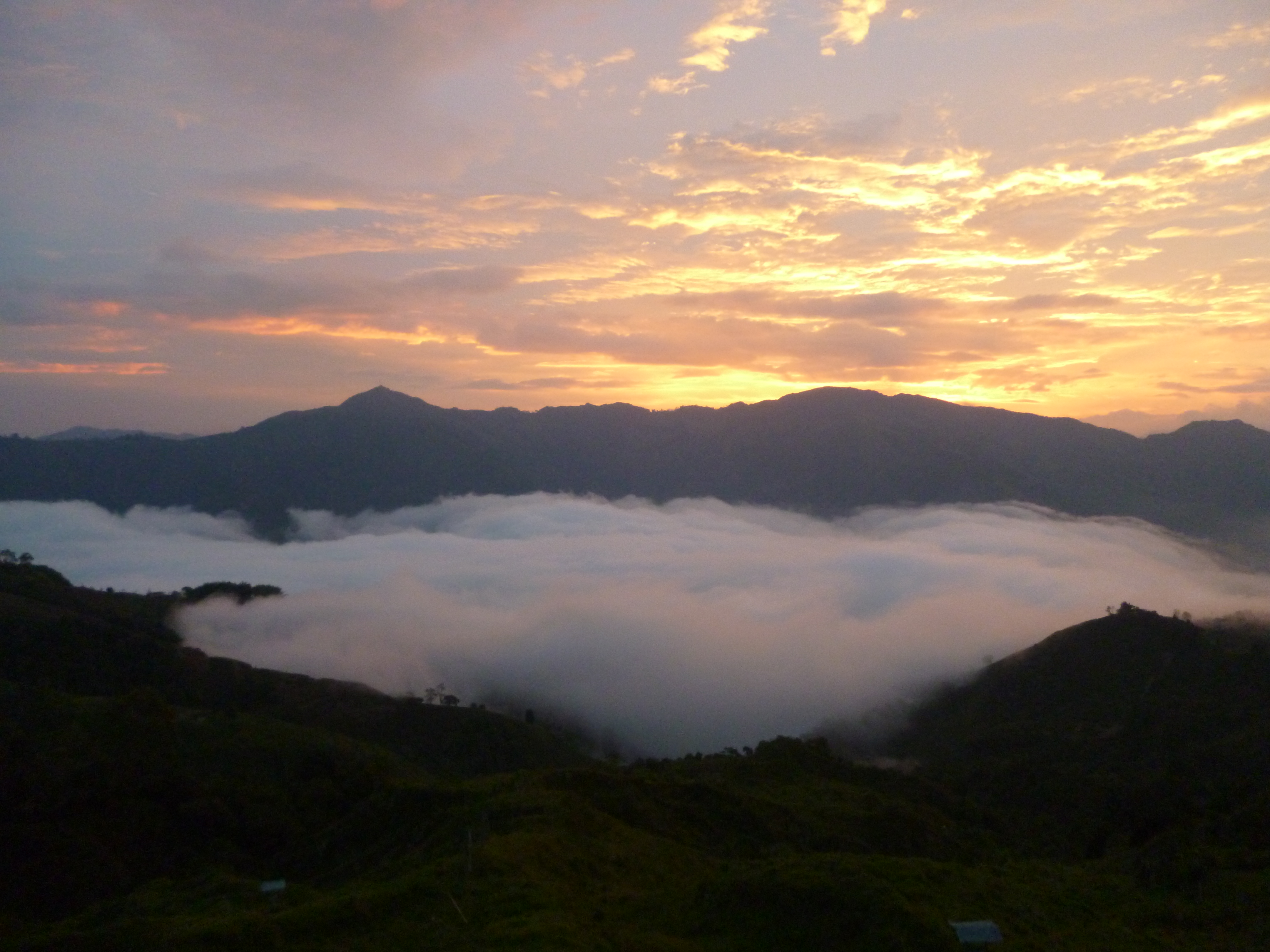 Amanecer en Santa Bárbara, Antioquia